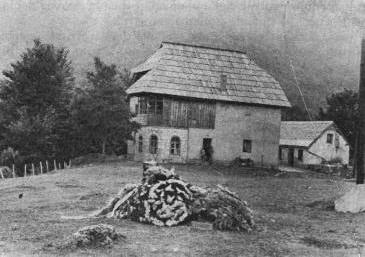 La Villa de Santic, la dernière demeure de Lazar Drljaca